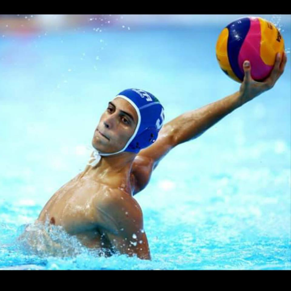 Gaetano Baviera in azione